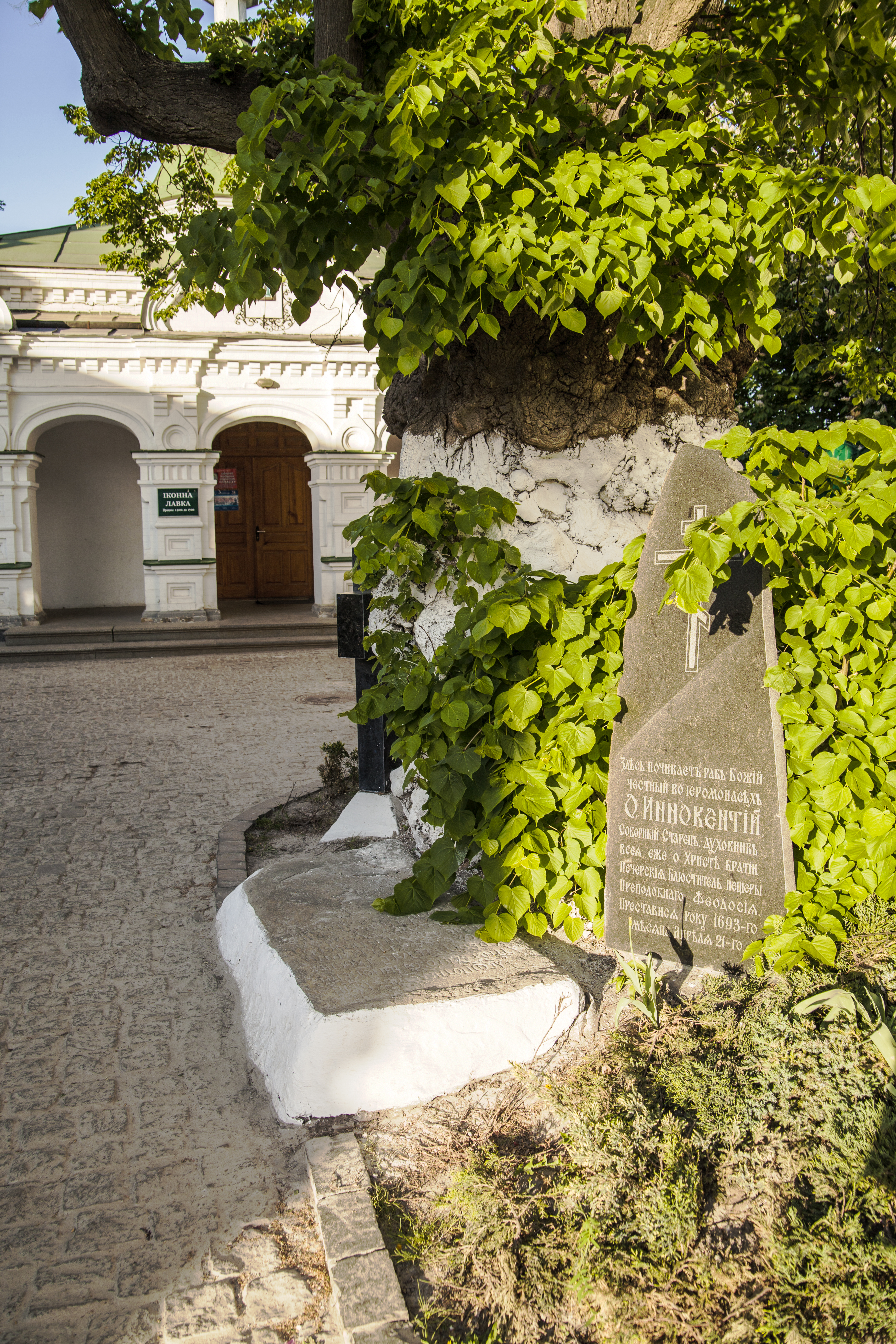 500—600 років. Обсяг 6,5 м. Висота 18 м. Липа на 300-400 років молодше за Феодосія Печерського, який її начебто посадив.